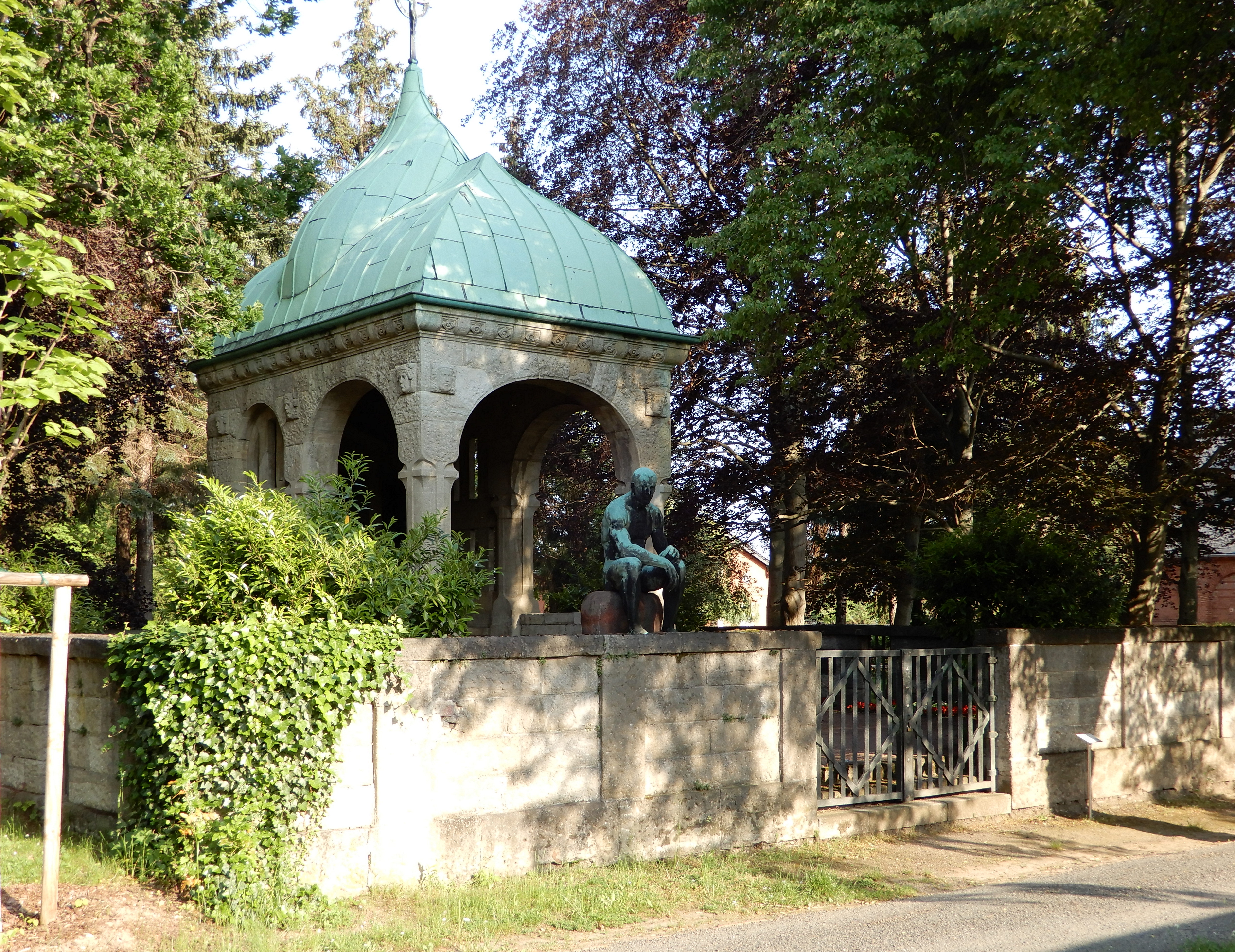 Grabanlage Heinrich Christian Bestehorn (1831-1907) und Minna Bestehorn geb. Baumeyer (1842-1907) auf dem Friedhof Aschersleben.